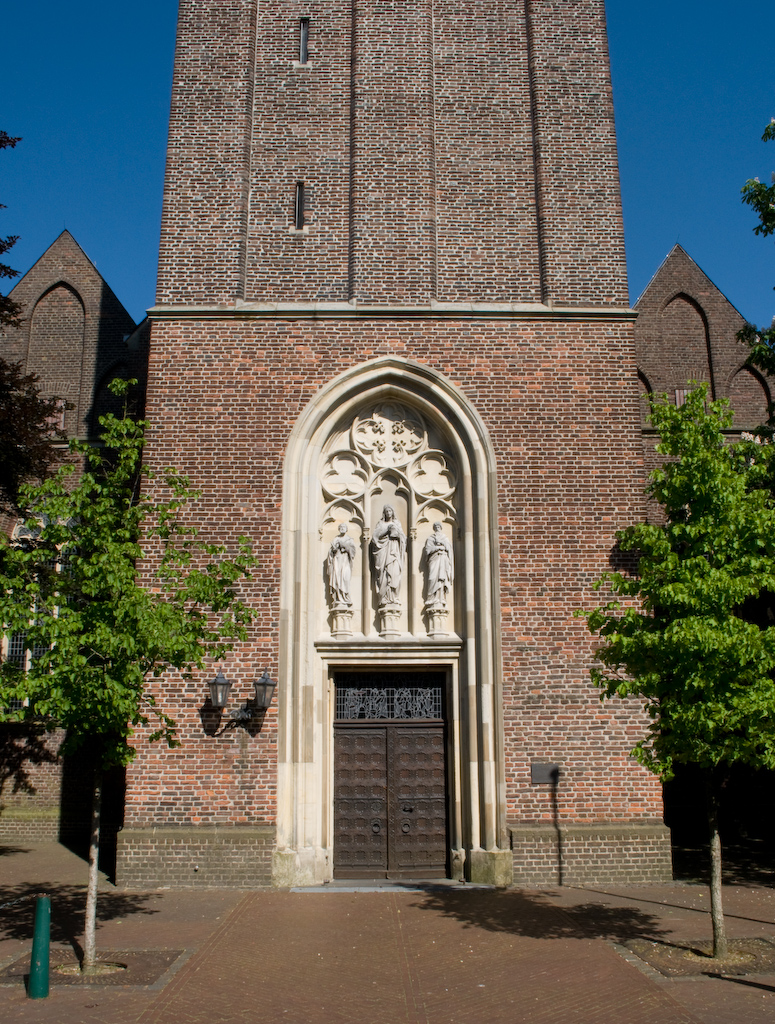 Eingang der St. Maria-Magdalena Kirche in Sonsbeck